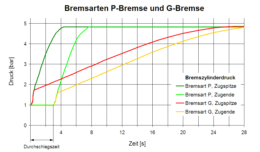 Die Bremszylinderfüllzeiten hängen von der Bremsstellung ab. In der Bremsart P (Personenzugbremse) werden die Luftdurchgänge im Steuerventil weniger gedrosselt als in der langsamer wirkenden Bremsart G (Güterzugsbremse).